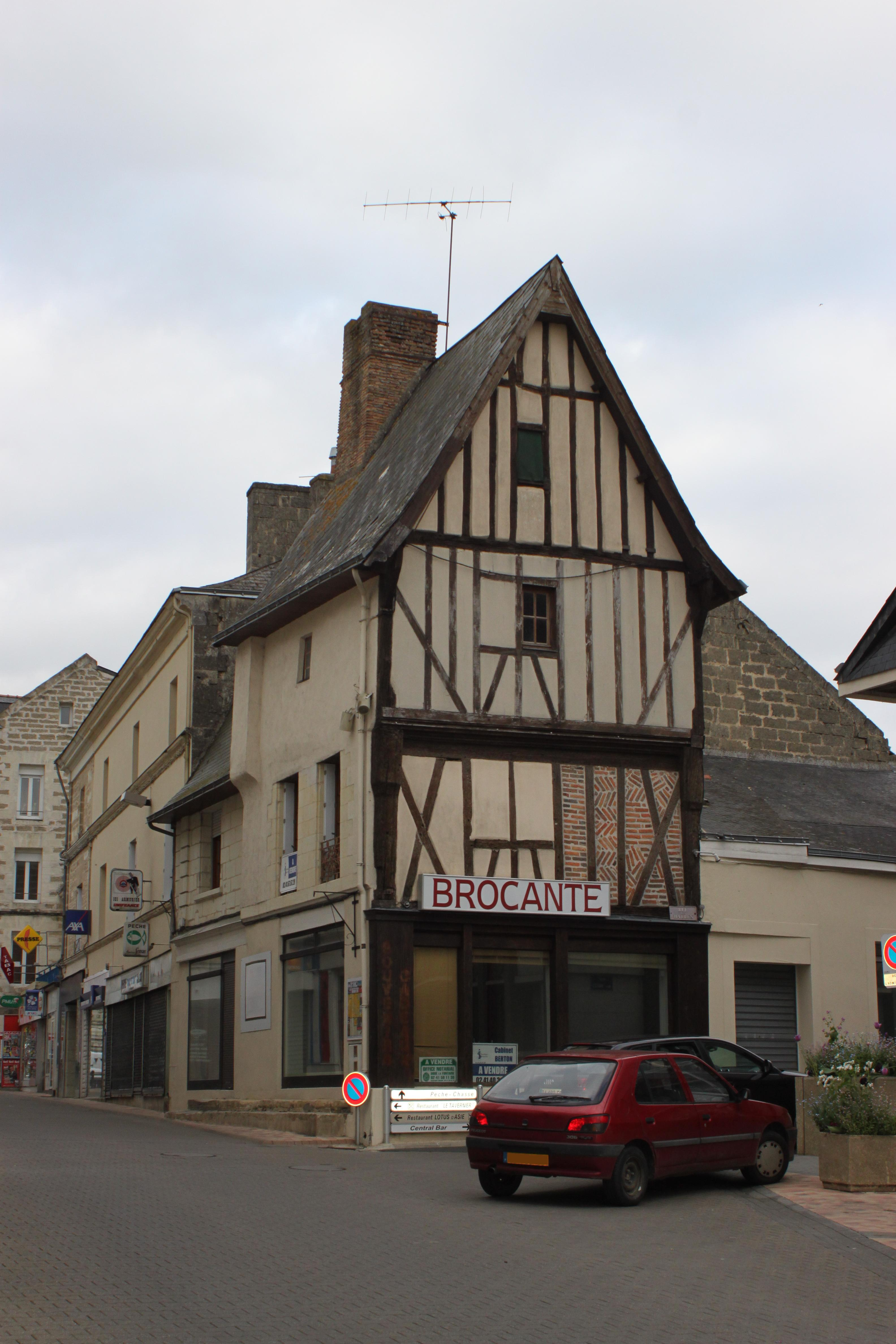 Maison à pans de bois, Fr-49-Doué-la-Fontaine.